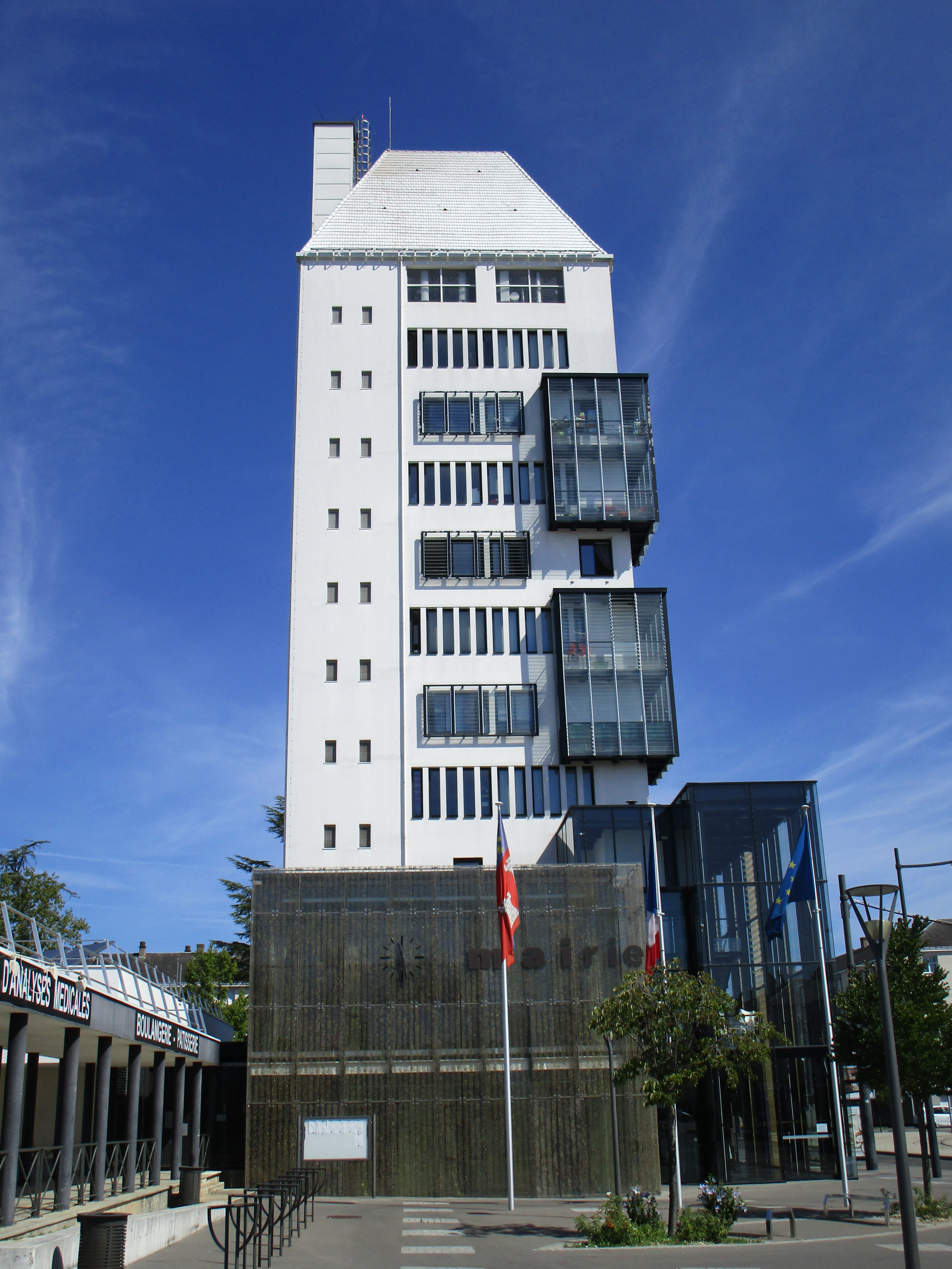 La tour du Beffroi, dans le quartier Beffroi-Europe à Tours Nord.